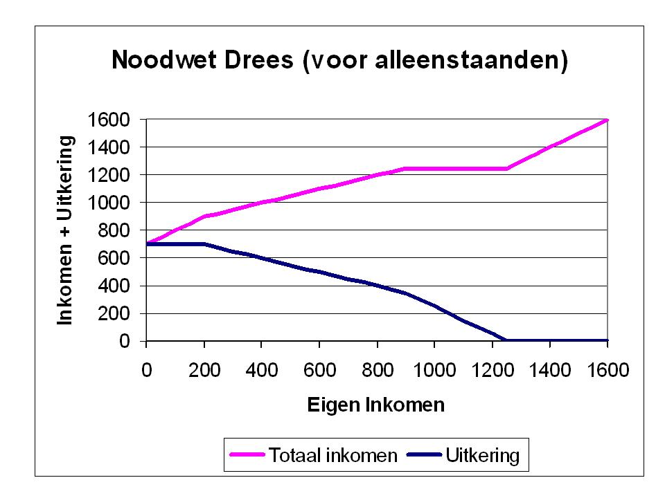 Zelfgemaakte Grafiek op basis van in artikel genoemde bron (Gerritse, P.L., Heb ik recht op een nooduitkering 3e druk, N. Samsom, Alphen aan den Rijn, 1954?)